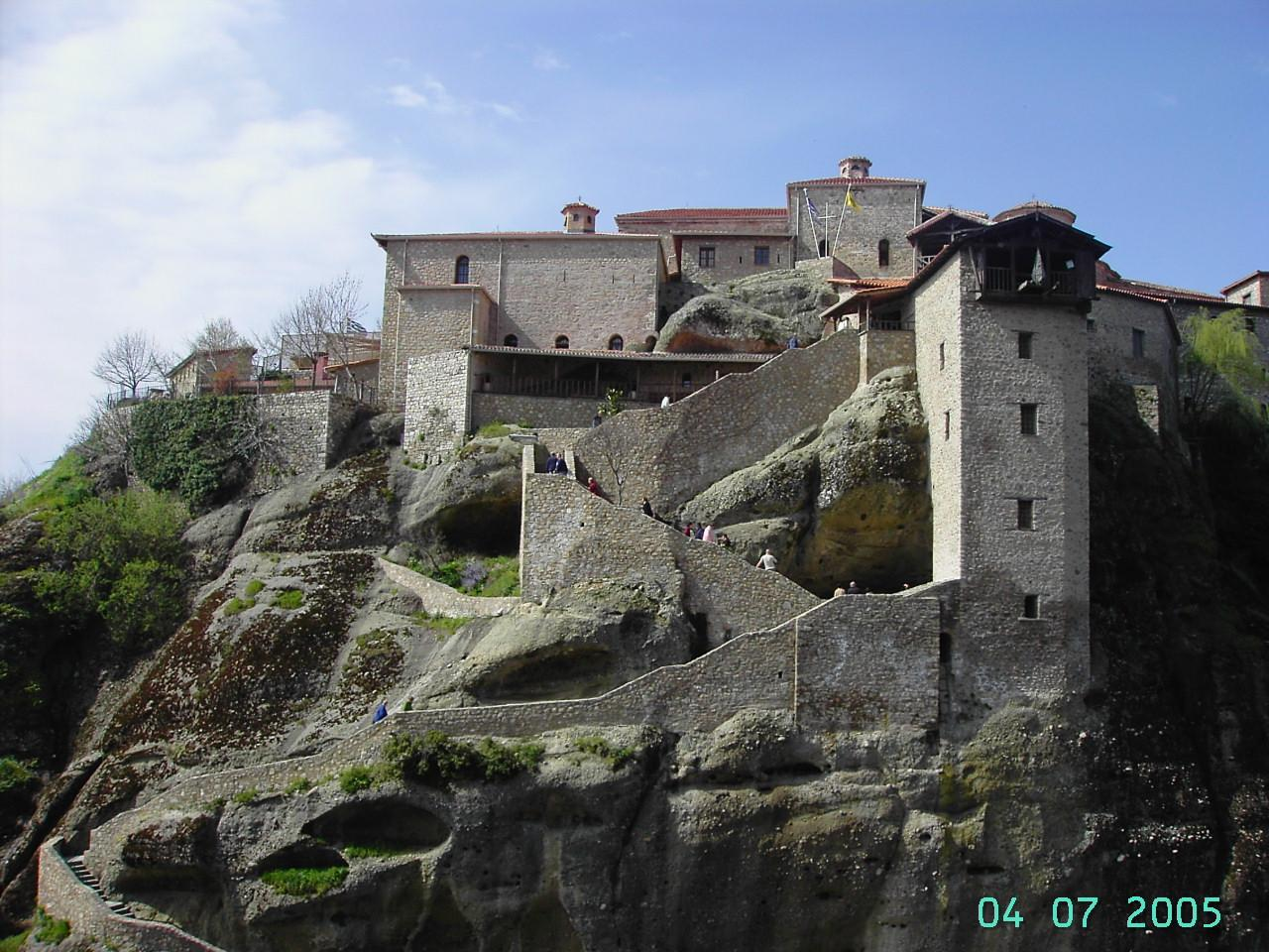 Foto Sofie Debognies April 2005